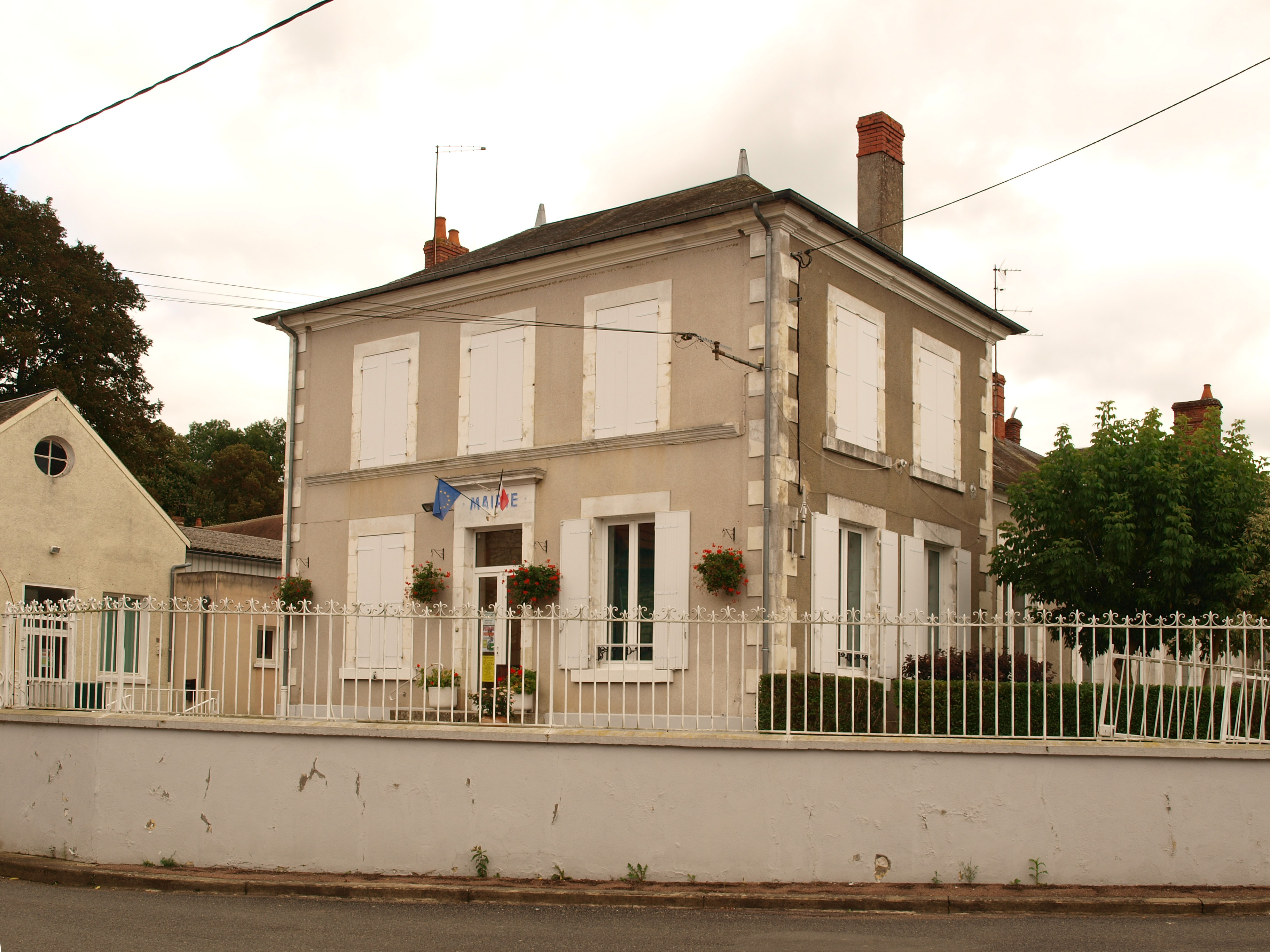 Annay (Nièvre, France) , la mairie